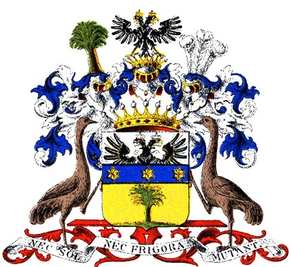 Ostermanni suguvõsa krahvivapp